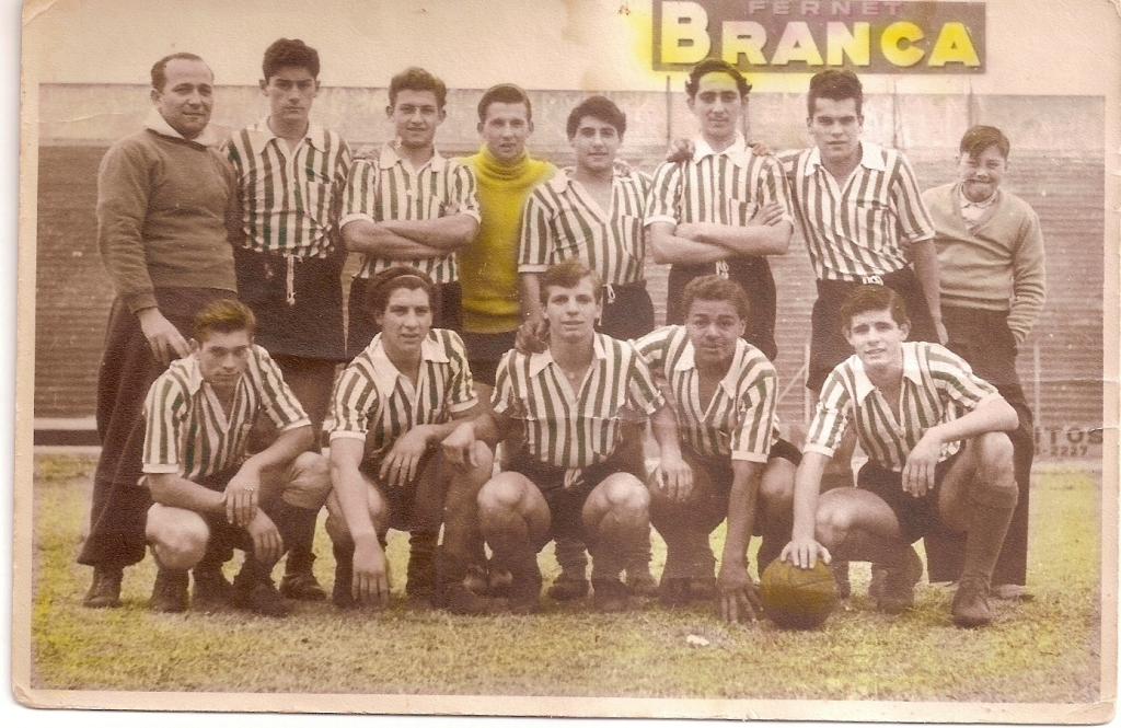 "Tres años jugando los once sin cambiar uno" Parados: Roberto Pierrepont (delegado), Daniel Antonelli, Huberto Lucano, Norberto García, Roberto Pérez, Antonio Manilo y Ezequiel LLanos. Sentados: Miguel Angel Filgueiras, Luis Suárez, Norberto Aguirre, Edgard Giordano y Horacio Benedetti.